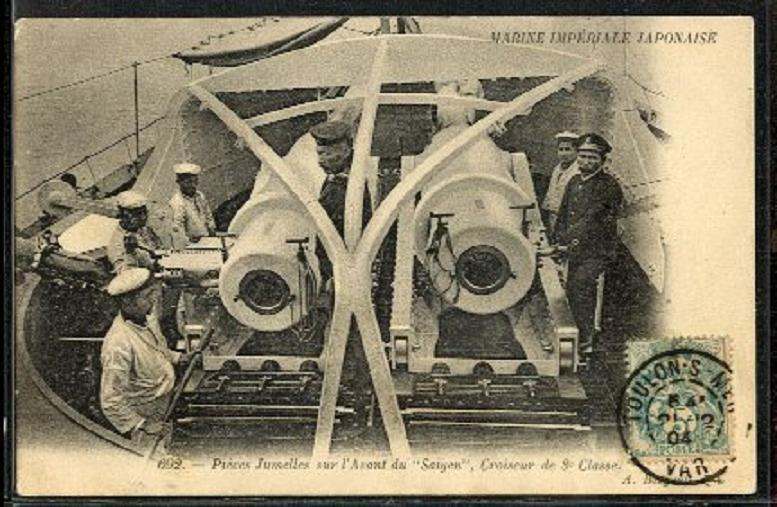 Фото орудий главного калибра канонерки "Сайен"